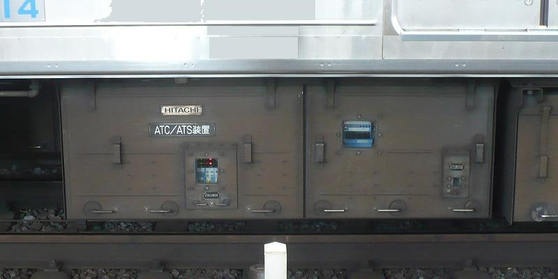 西武6000系のATC装置